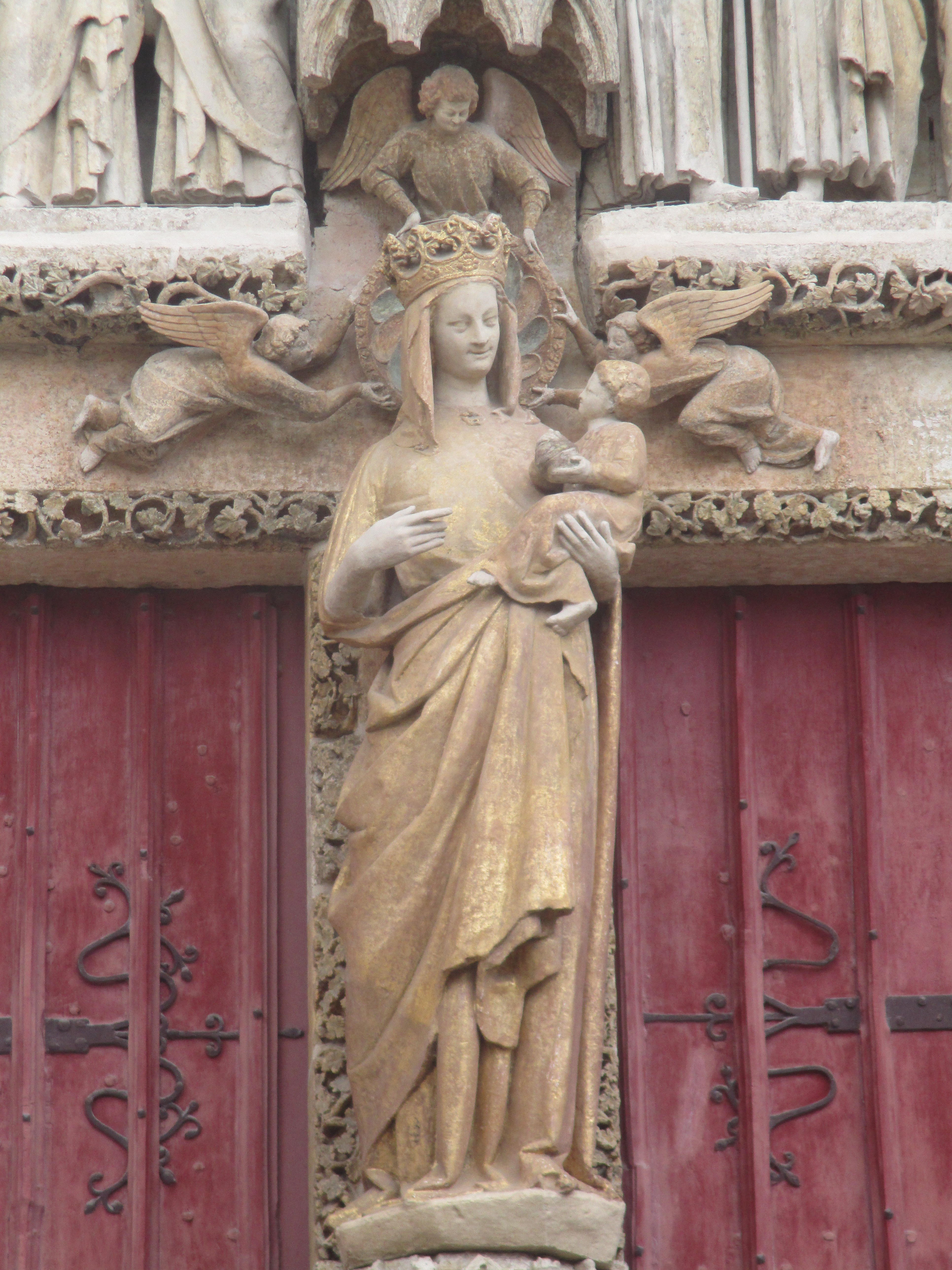 La Vierge Doréeː statue sur le trumeau du portail sud de la cathédrale Notre-Dame d'Amiens.